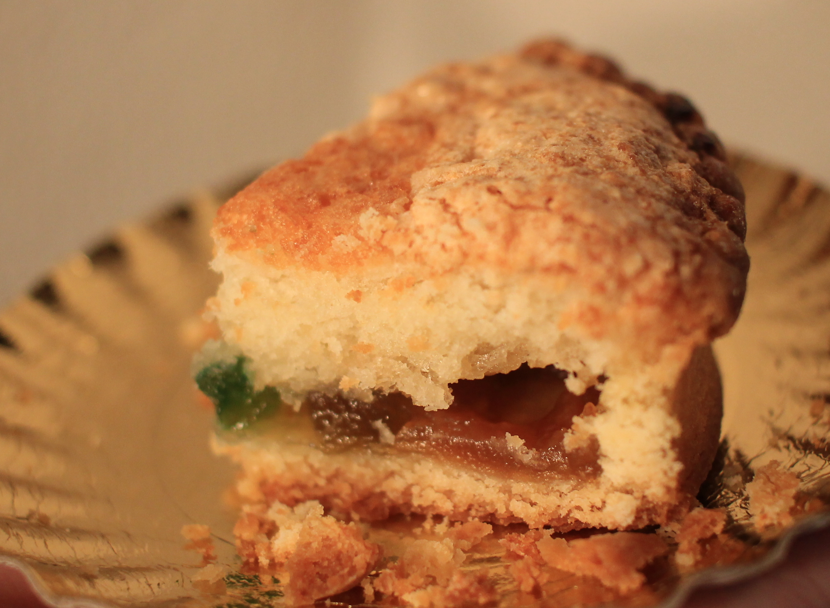 L'intérieur d'un nougat de Tours.